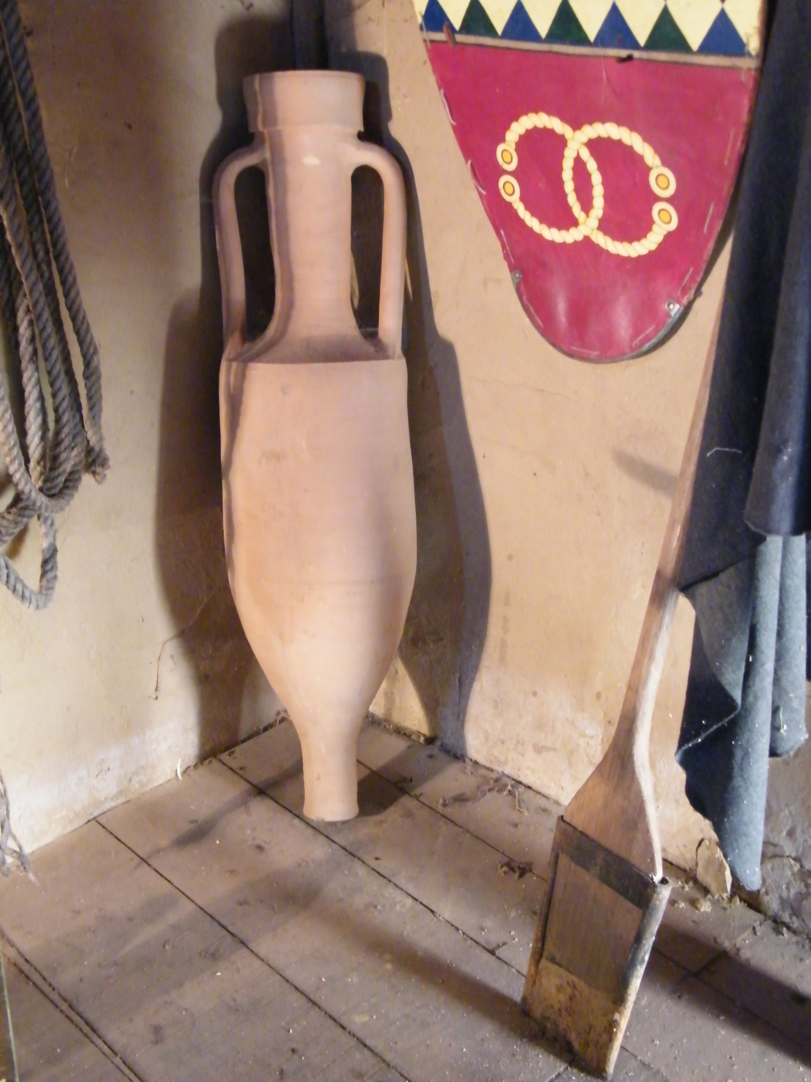 Pont-Rémy, Somme, Fr, Ambiani, amphore romaine et bêche gauloise dans un intérieur gaulois reconstitué.